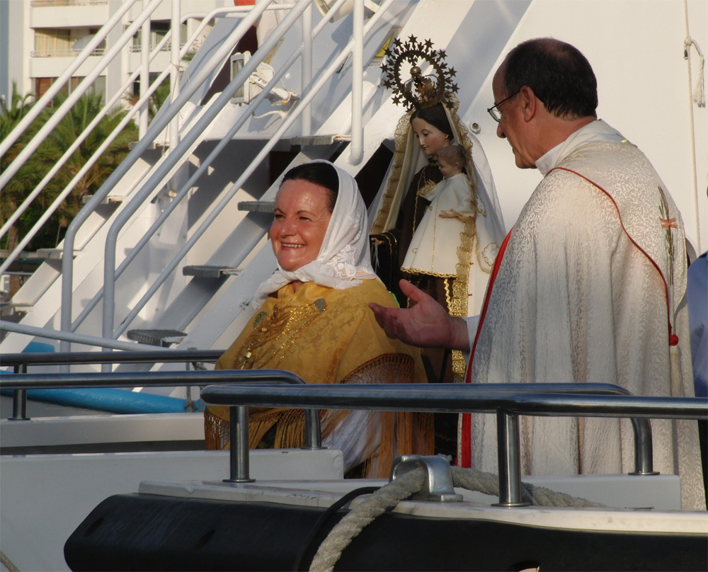 Stella Maris, Dia del Carmen, 16.Juli; Schutzpatronin aller Seeleute, Fischer und der spanischen Armada, Sant Antoni de Portmany, Ibiza An diesem Tag wird die 'Schutzpatronin' in einer Prozession von der Kirche zum Hafen getragen und auf ein Boot gebracht. Etliche geschmückte Boote folgen dem Hauptboot mit dem Bischof und der Heiligenfigur aus dem Hafen, drehen eine große Runde in der Bucht, hupen und es werden zu Segenssprüchen Blumen ins Meer geworfen. Dann fahren die Boote zurück und die Madonna wird wieder in die Kirche getragen.